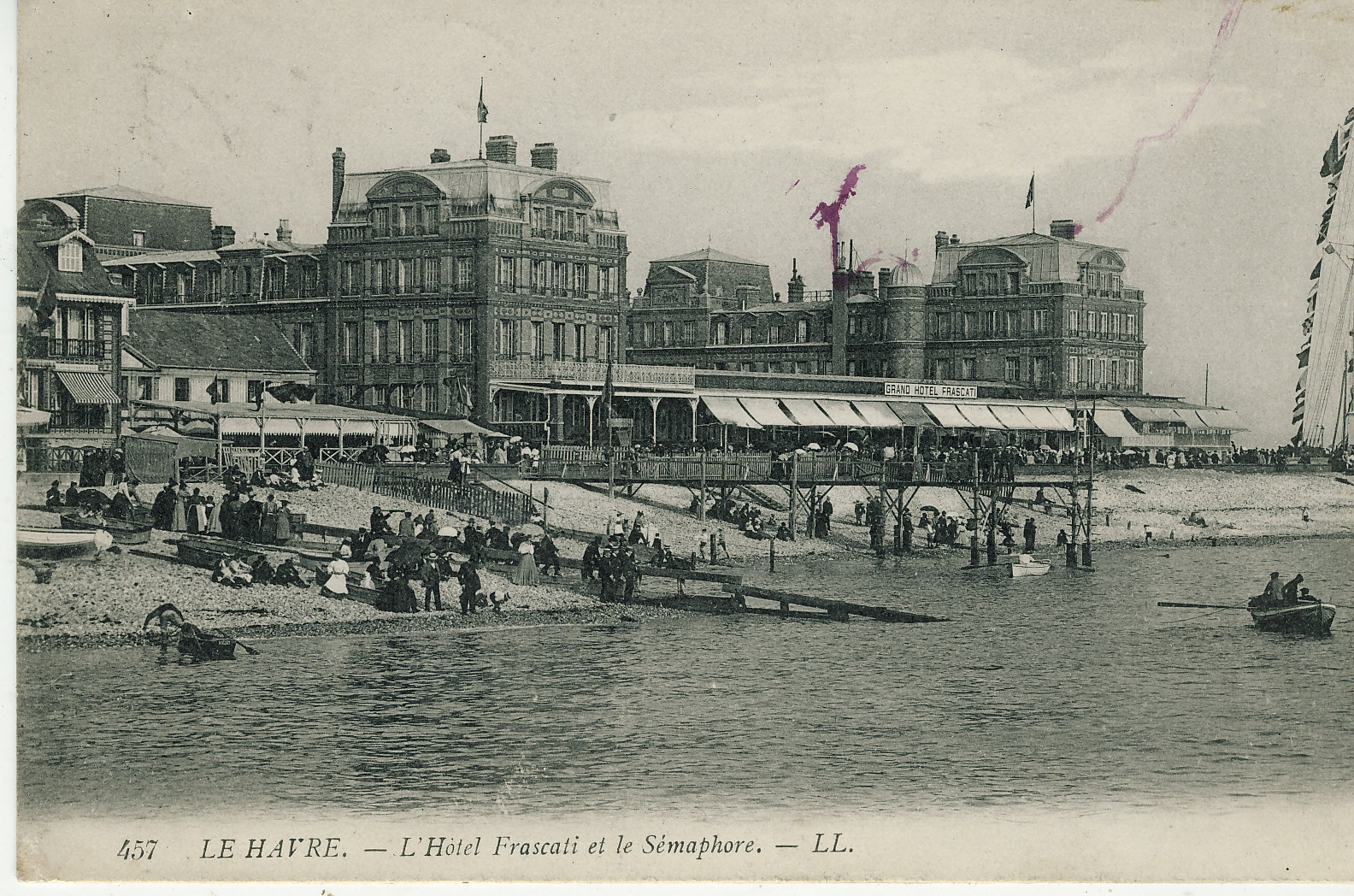 le Havre en 1900